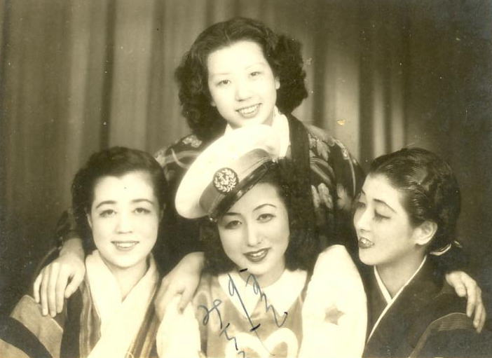 住江みちるのブロマイド